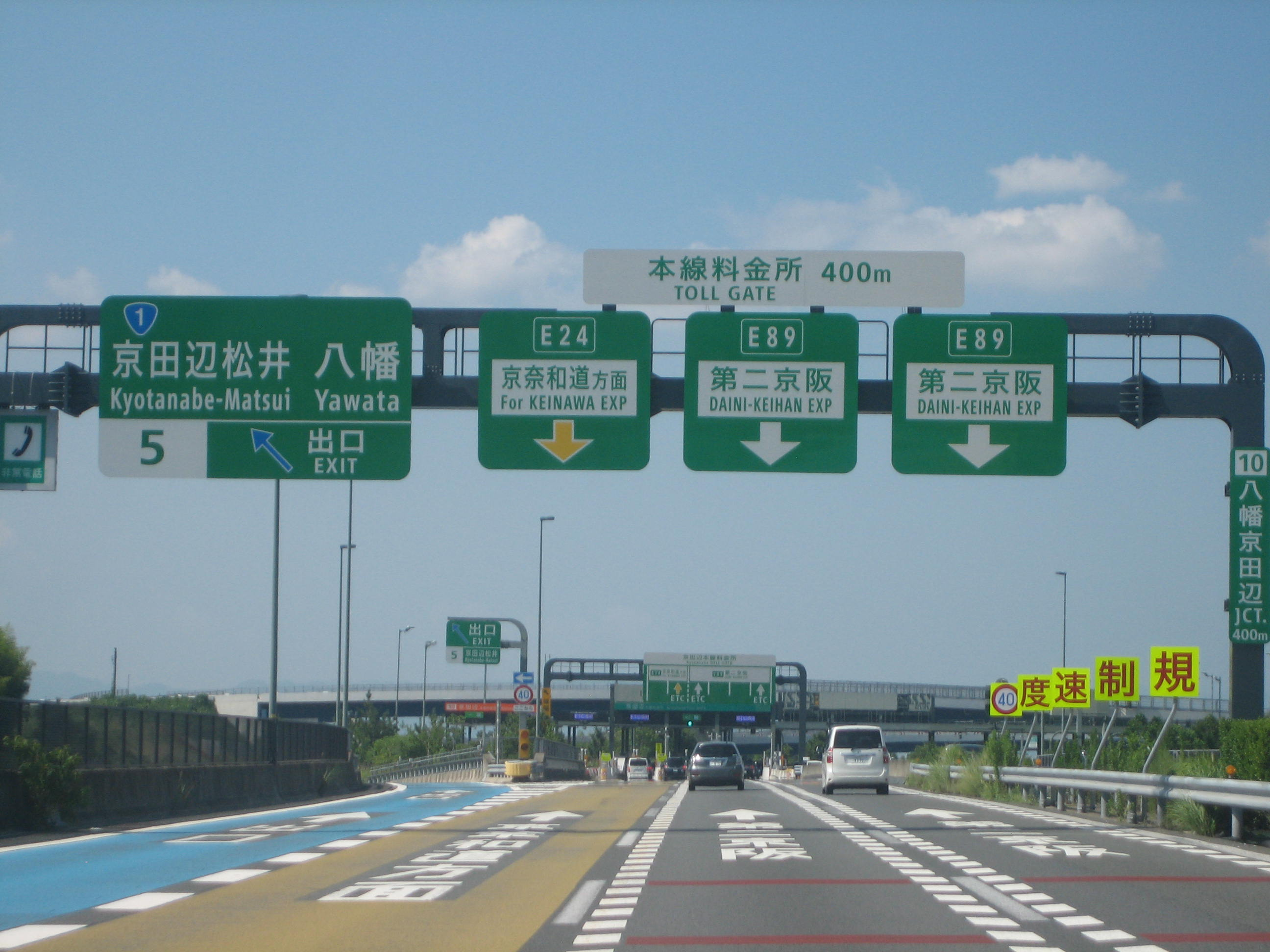 京田辺松井IC